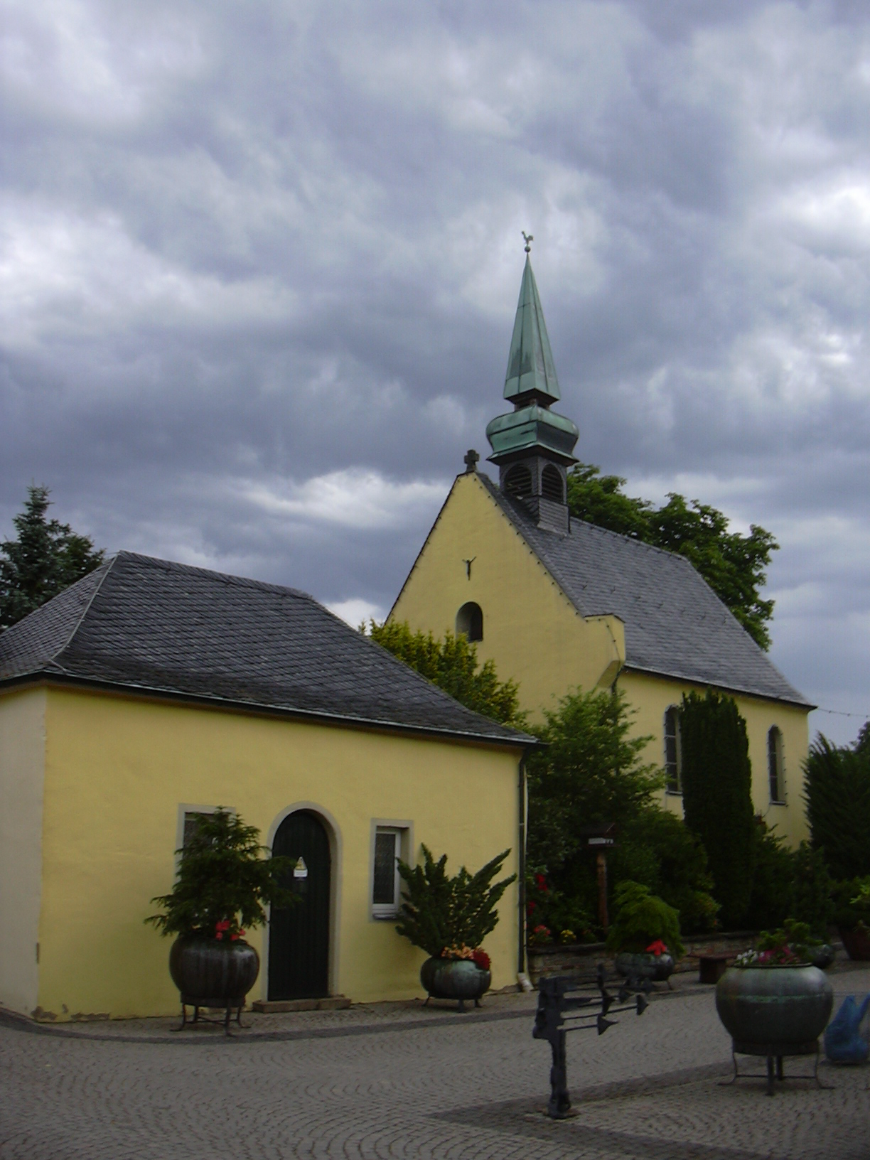 Jakobsbergerhof, Rhine Valley/Germany